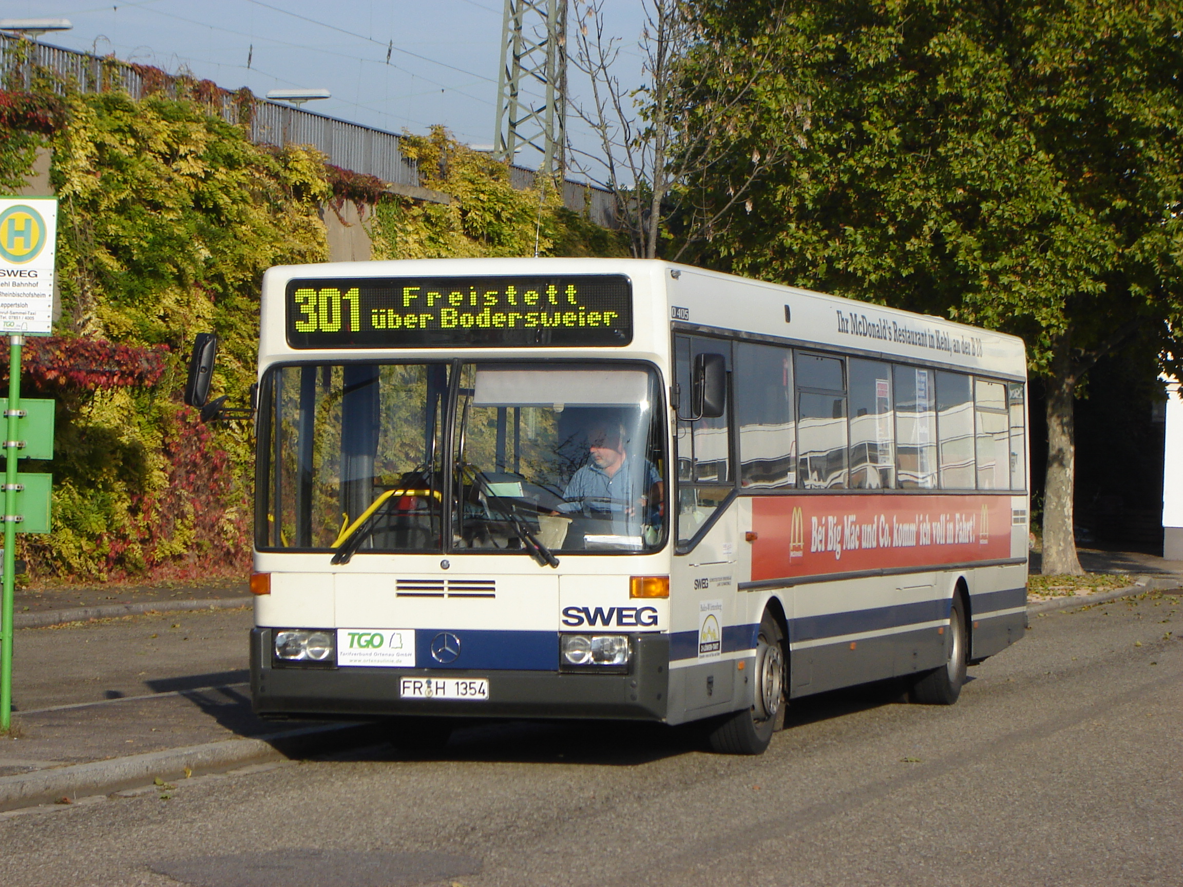 Mercedes-Benz O 405, SWEG, devant la gare de Kehl (Allemagne)